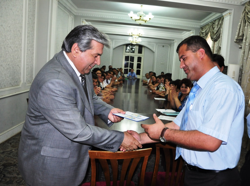 Проректор ХГУ им. Б. Гафурова Рахимов А. во время вручения удостоверений преподавателям университета (май 2013 год, г. Худжанд)